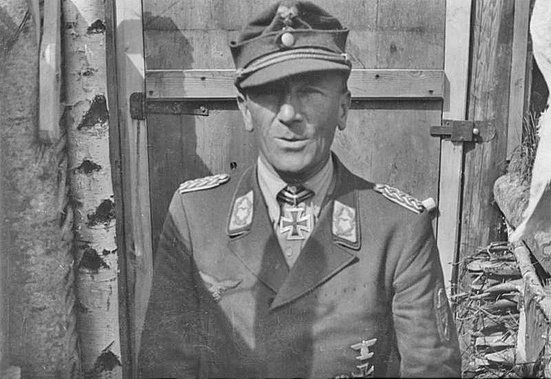 Scherl Eugen Meindl, Generalmajor der Fallschirmjägertruppen 4830-42